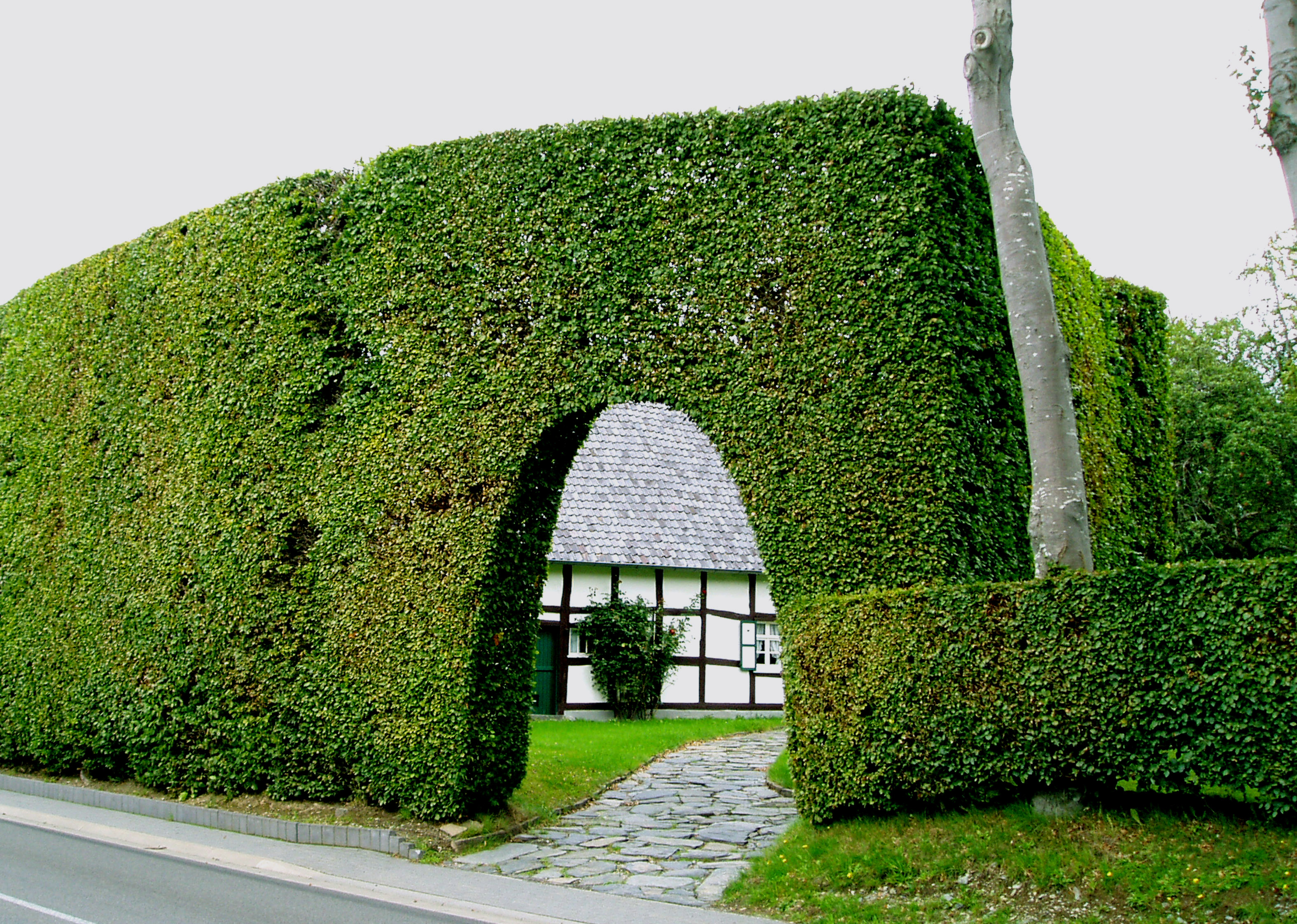 Heckentor in der Monschauer Heckenlandschaft in der Eifel